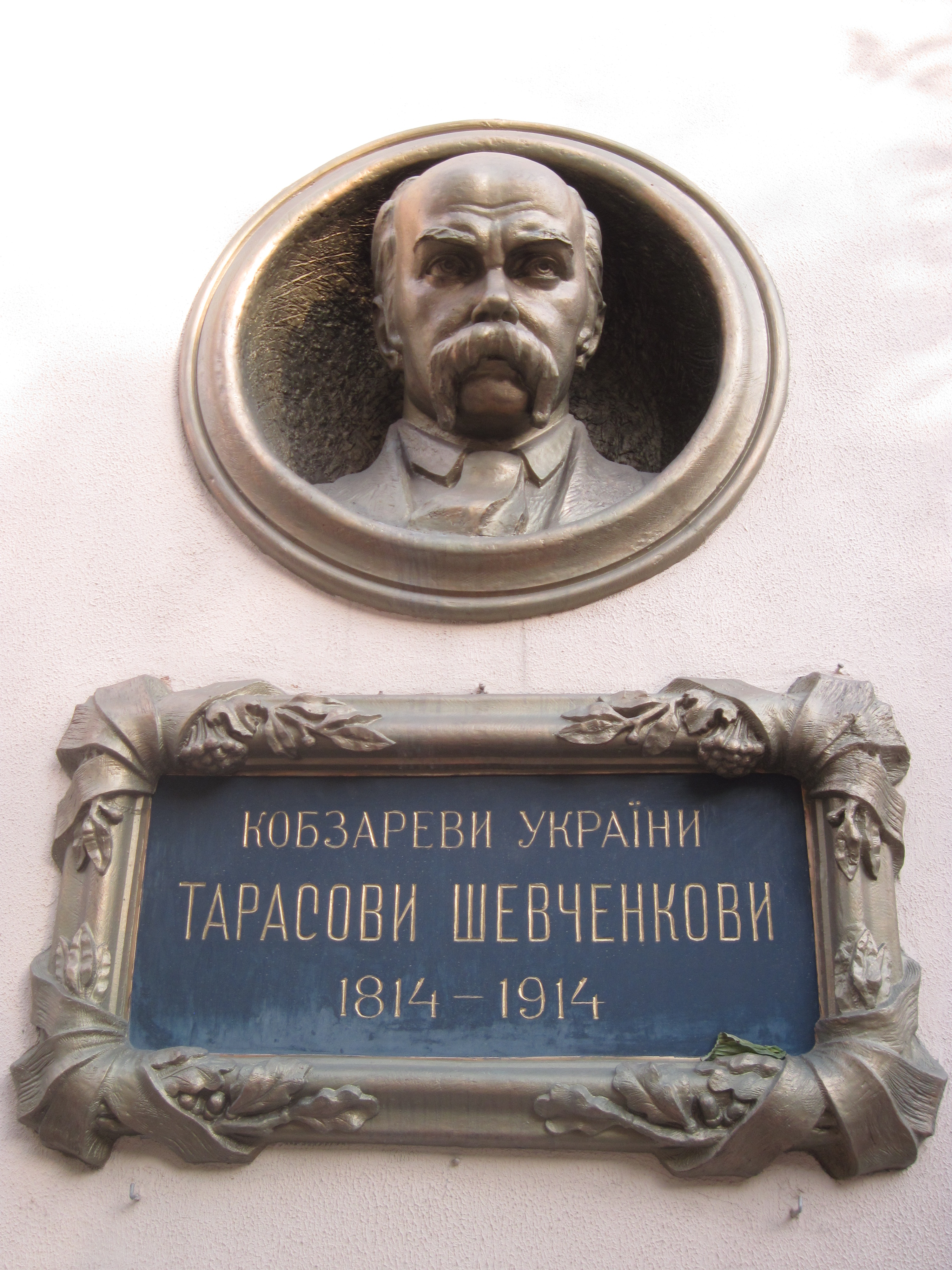 Пам'тна дошка Т. Шевченку, Просвіта, Франківськ